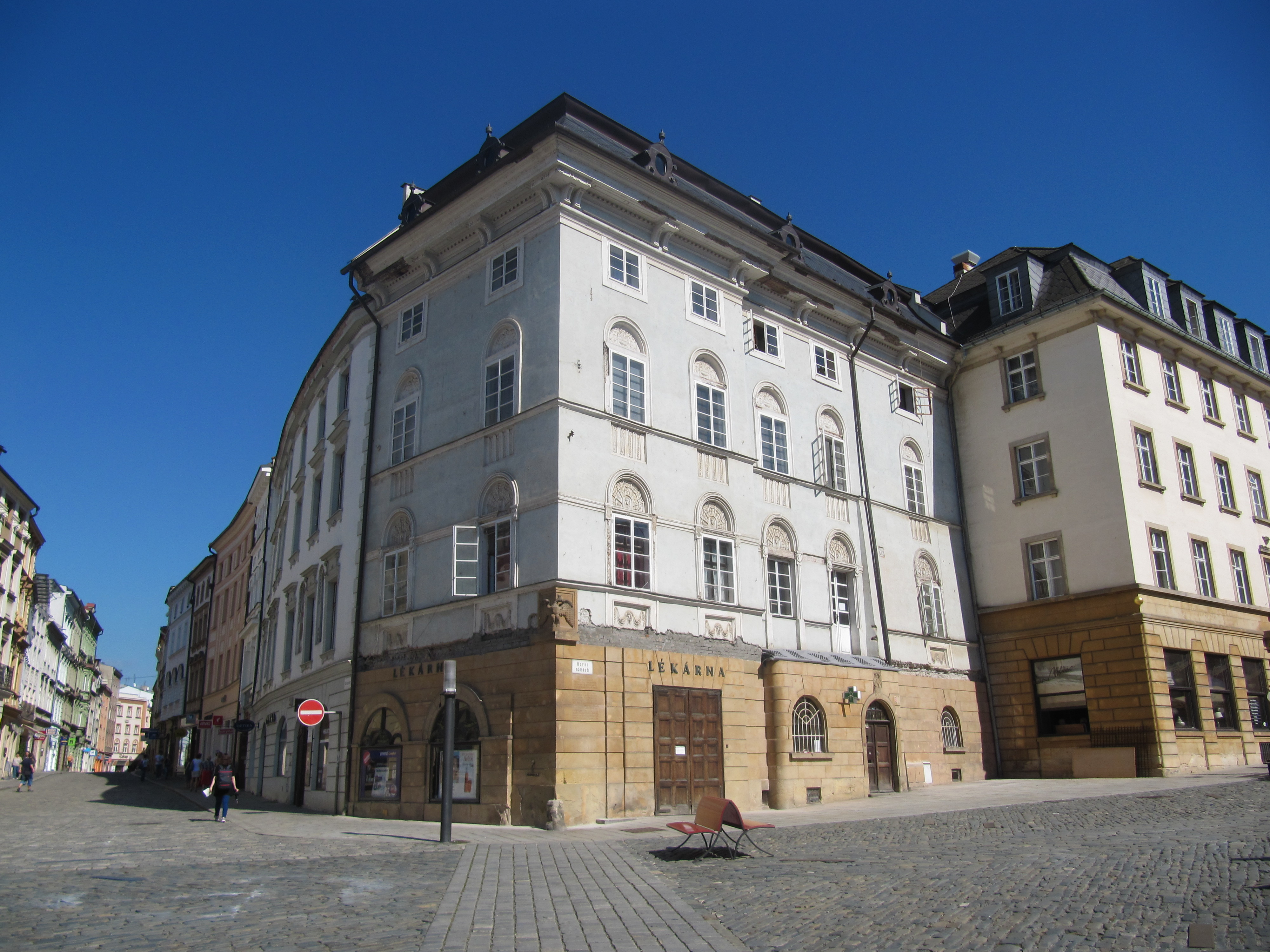 Domy čp. 323, 324, Horní náměstí 323/10, Ostružnická 323/4, Olomouc.